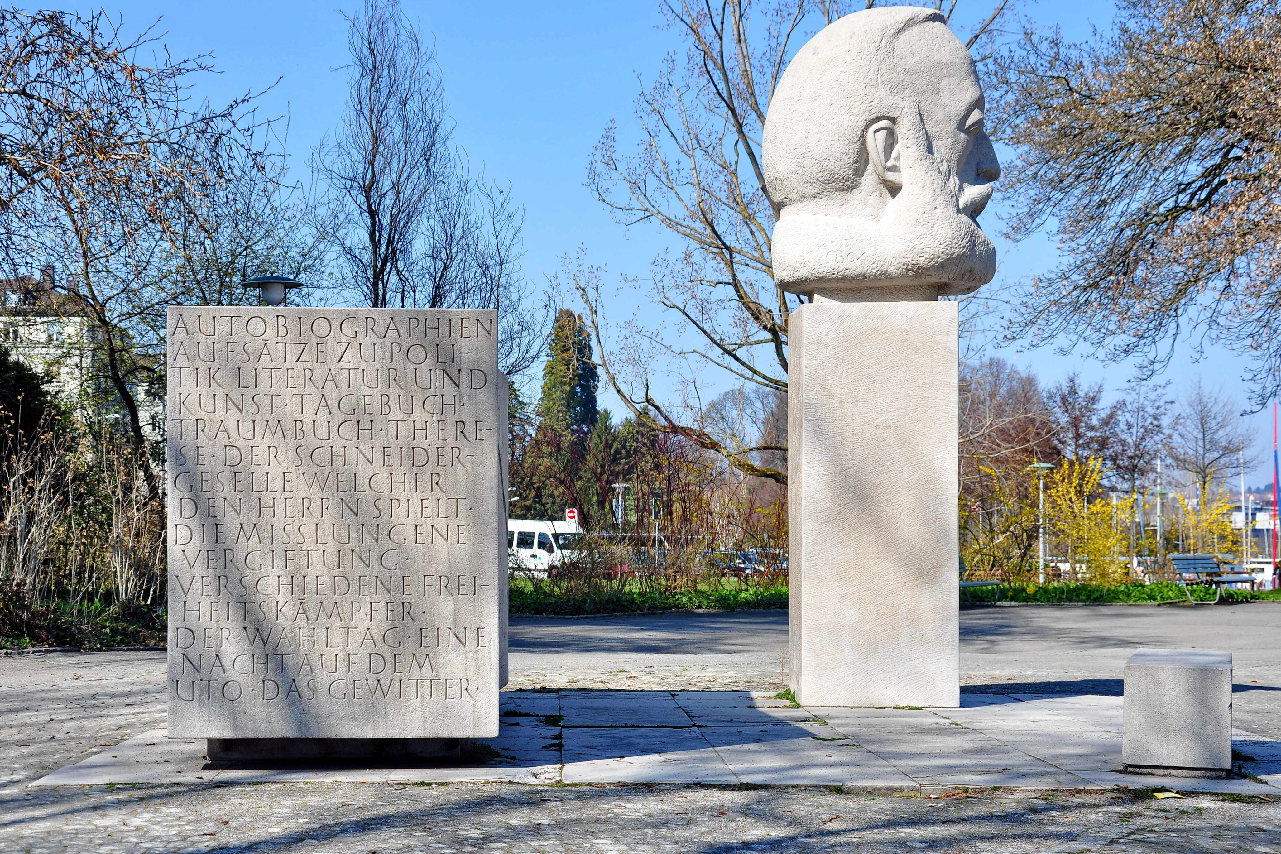 Gottfried Keller Gedenkstätte in Zürich-Enge (Switzerland)